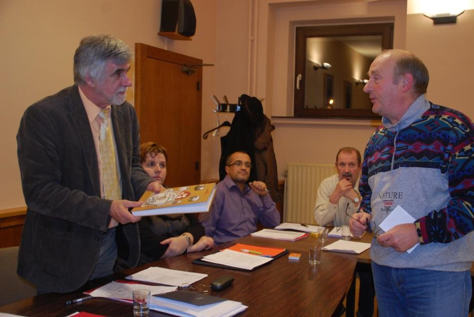 Monografia loc.Aruncuta ajunge in mana primarului comunei Musson { sursa fotografiei : arhiva d-lui Albert Beulesns }